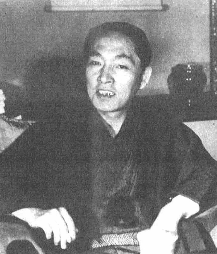 読売新聞社『家庭よみうり』383号（1954年）より富田常雄